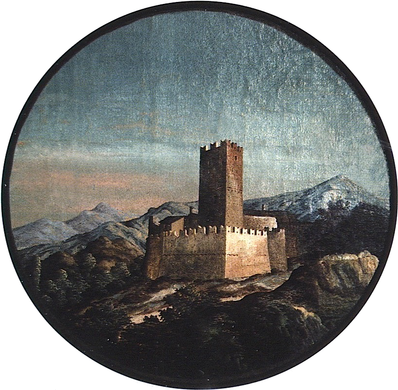 Il Castello Tour de Villa di Gressan dopo i restauri, dipinto anonimo di fine Ottocento, conservato ad Aosta, Collezioni Regionali. (Foto del dipinto di L. Guidani, conservata presso l'Archivio fotografico per i Beni Culturali, Aosta). Scansione della foto stampata: Patafisik.